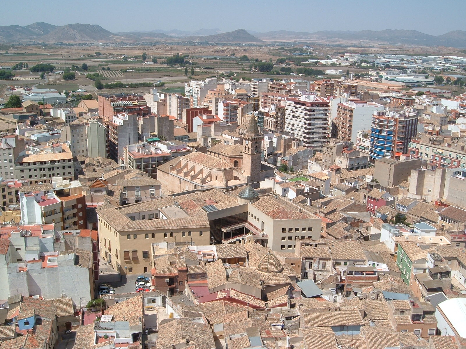 Centro de la ciudad desde la torre de la Atalaya